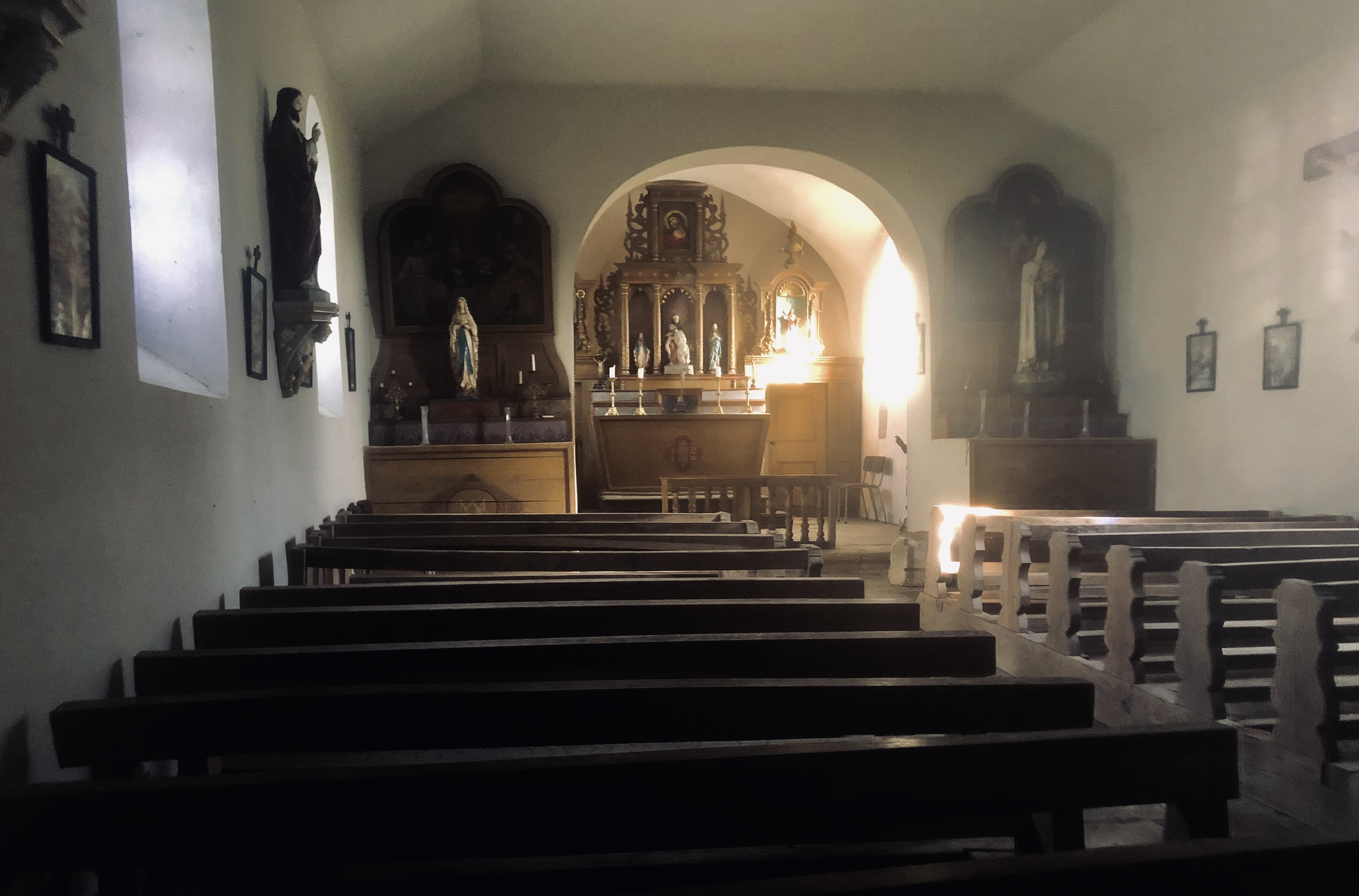 De banneschten Deel vun der Kapell zu Schweech